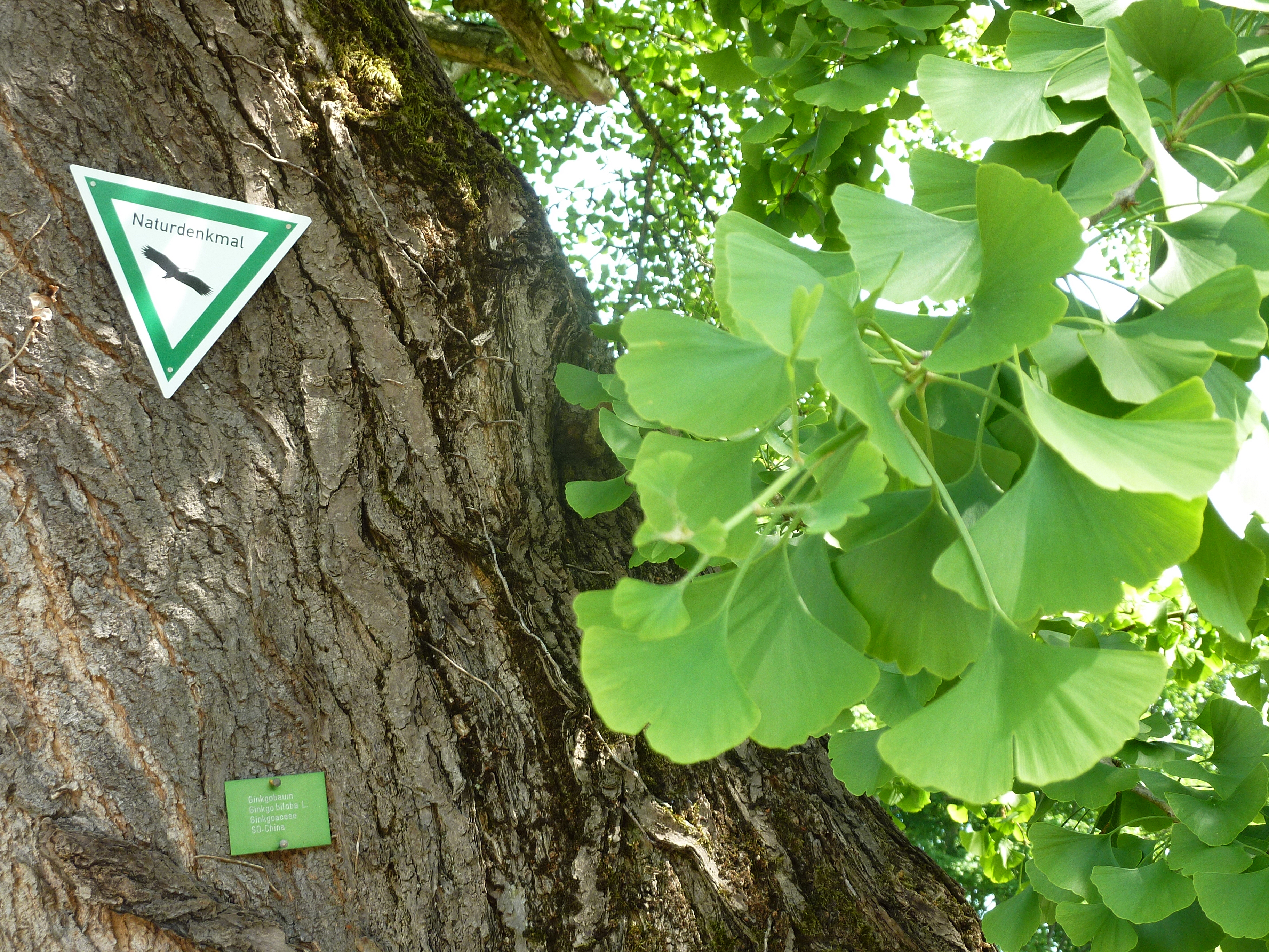 Frankfurt am Main, Stadtteil Rödelheim: Der Ginkgo in Rödelheim ist ein im Jahr 1750 gepflanztes Exemplar der aus China stammenden Baumart Ginkgo biloba. Der rund 18 Meter hohe Einzelbaum steht in Alt-Rödelheim auf dem Grundstück des Petrihauses am Ufer des Flusses Nidda, gegenüber dem Brentanopark. Dieser Ginkgobaum gilt als das älteste Exemplar seiner Art in Deutschland und hat den Status eines Naturdenkmals. Der Baum ist nur eingeschränkt für die Öffentlichkeit zugängig.